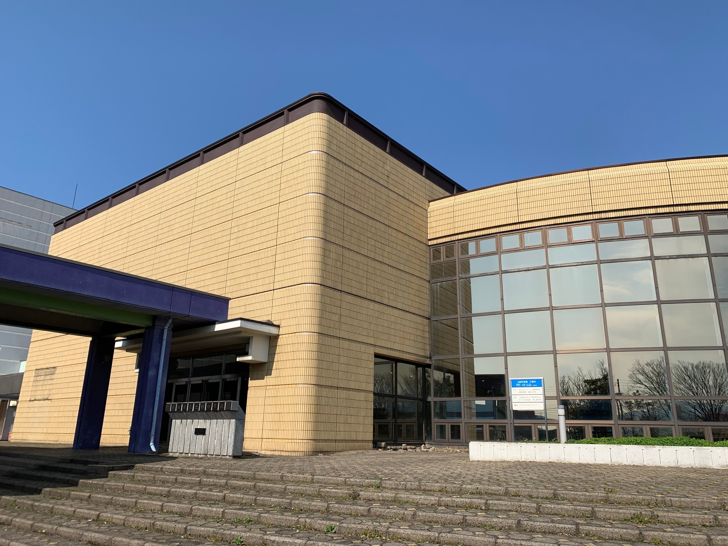 上越科学館（2020年4月）